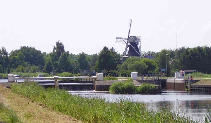 Sluis bij Veelerveen in het B.L._Tijdenskanaal. Zelf gemaakte foto